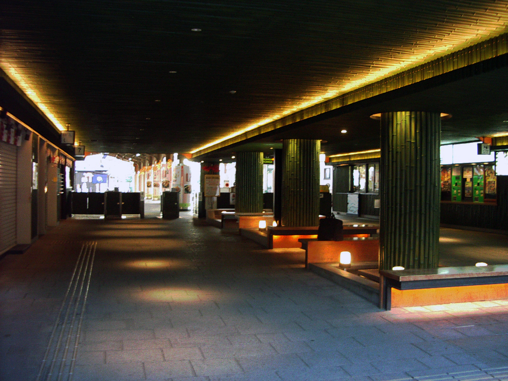 京福電鉄嵐山本線嵐山駅 2007年11月、投稿者が撮影